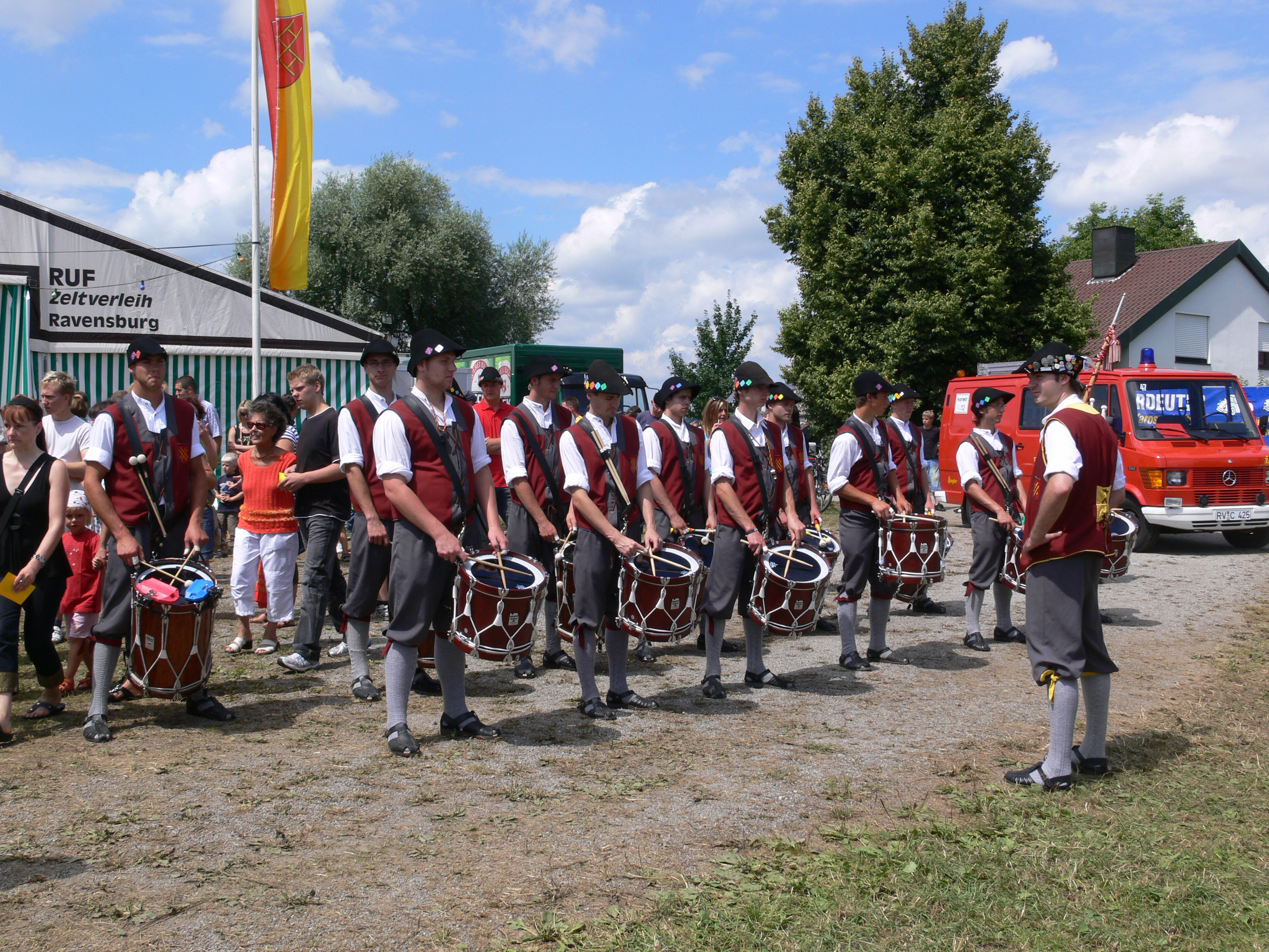 Begfesttrommler am Bergfest 2008, 88276 Berg, Landkreis Ravensburg